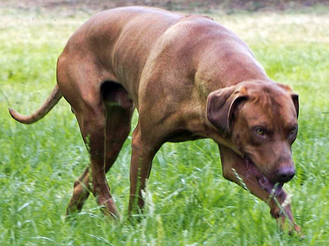 Rhodesian Ridgeback en recherche naturelle, au nez ( perception d'effluves) et à vue (detection de traces); l'encolure à mi-hauteur; vidocq M'tanami of wolwekraal.